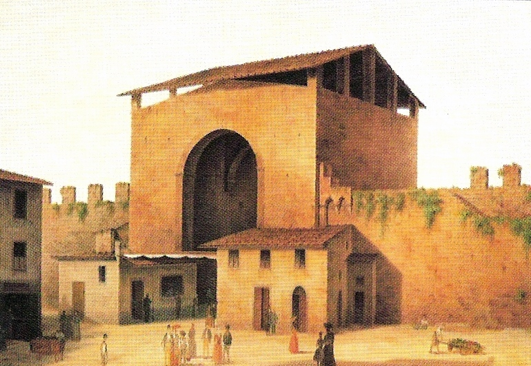 Porta a San Frediano (interno)